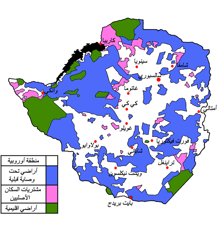 .ترجمة خريطة روديسيا الى اللغة العربية Rhodesia Land Map translated into Arabic.